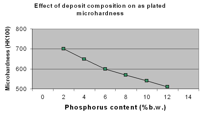 schéma electroless nickel